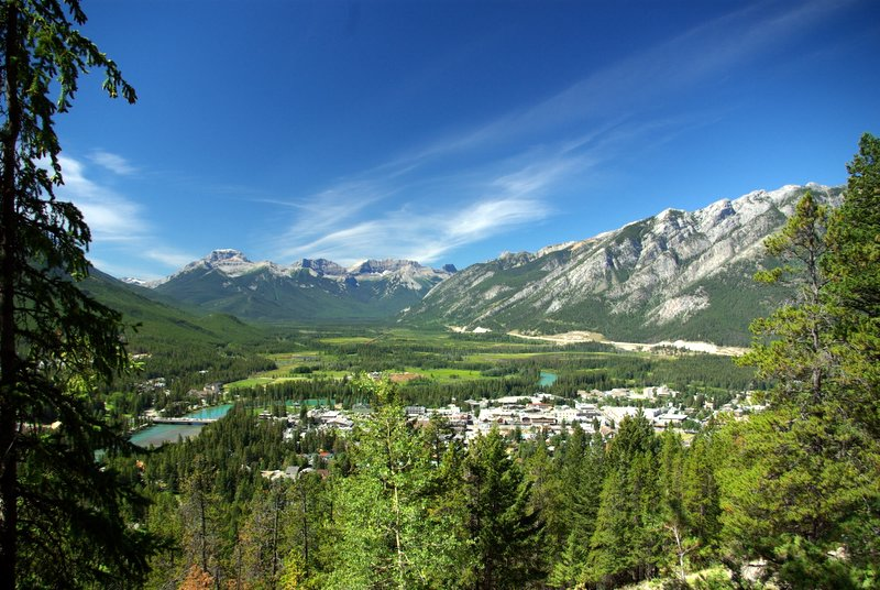 Údolí kolem města Banff